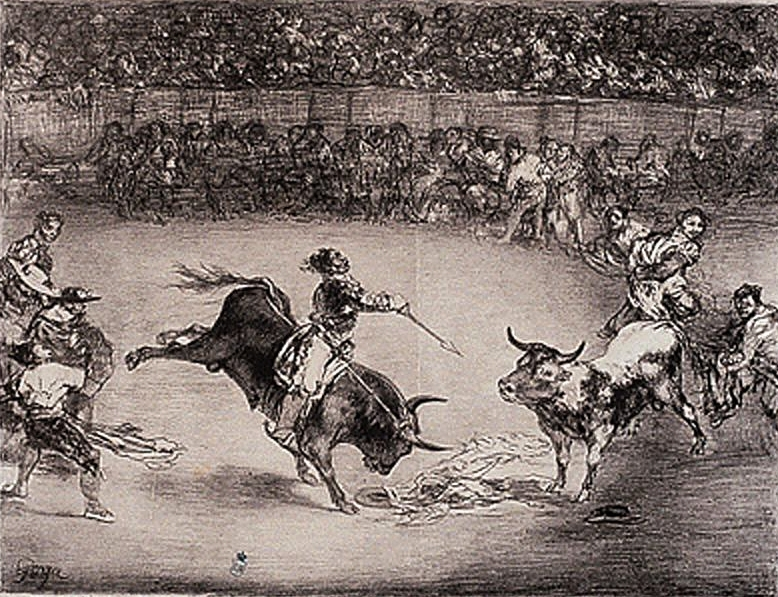 «El famoso americano Mariano Ceballos» Litografía perteneciente a "Los toros de Burdeos"